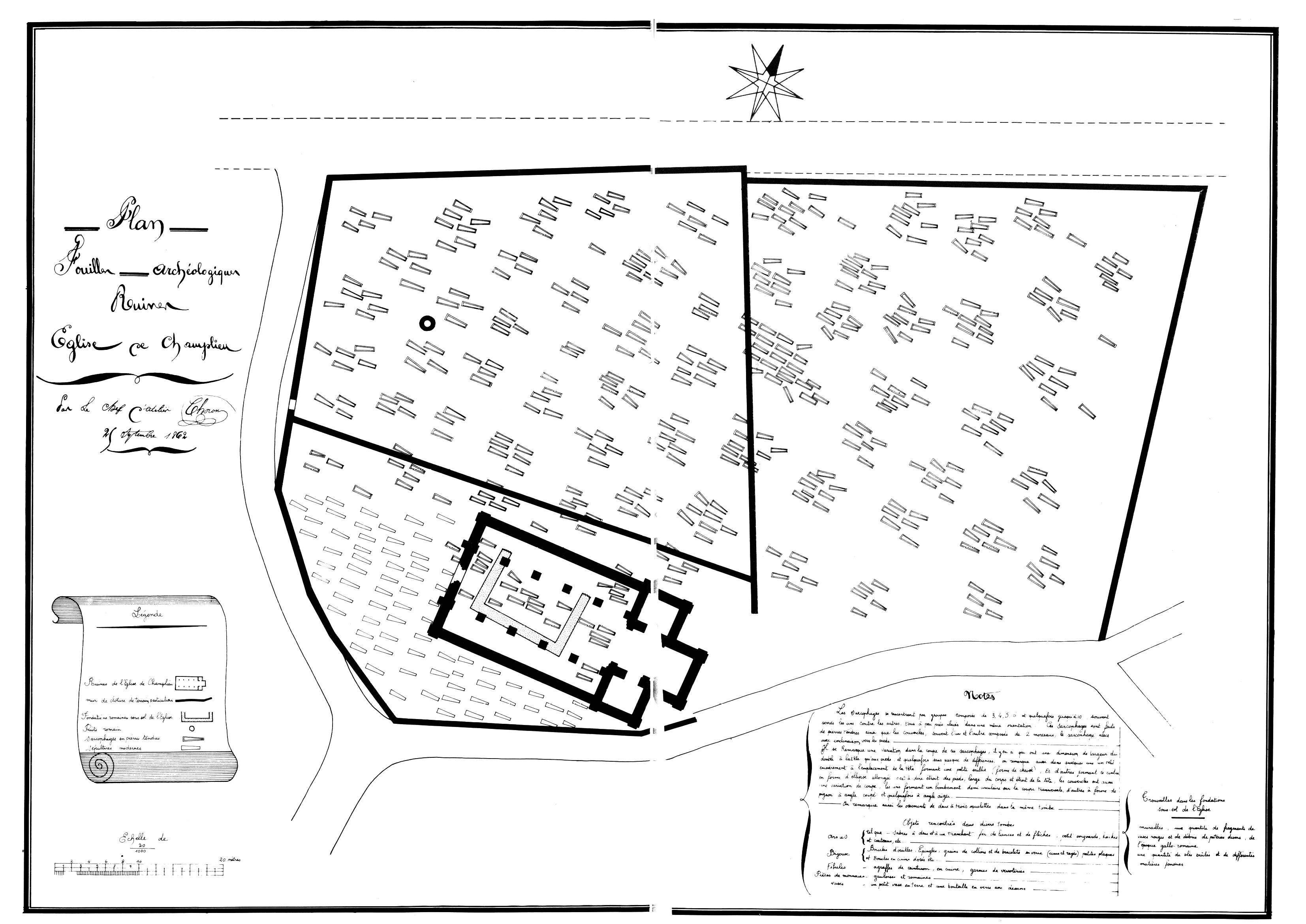 Plan des fouilles exécutées par Choron entre 1862 et 1870, calqué sur une copie non datée.